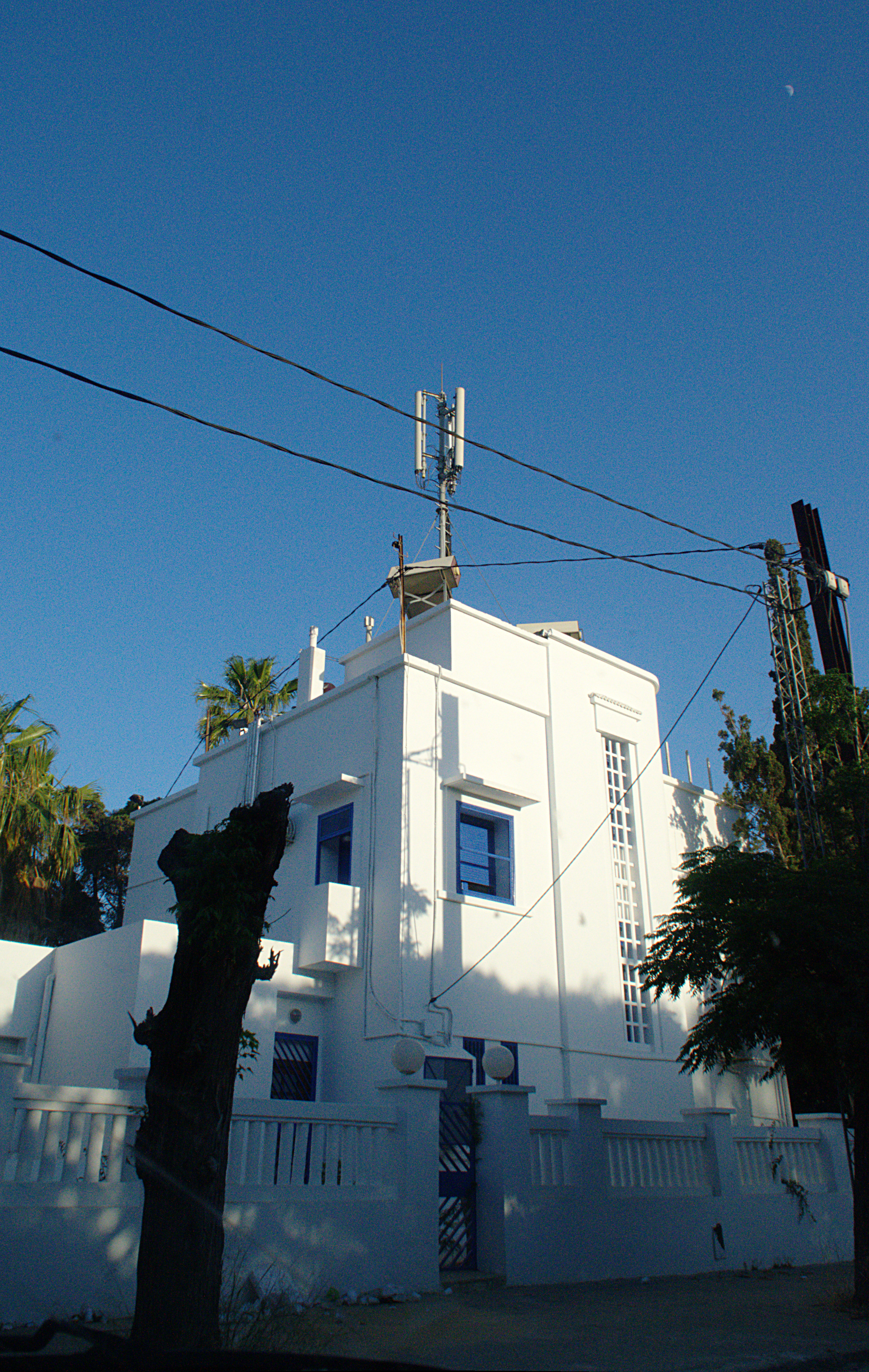 Vue sur le bâtiment de l'Agence tunisienne de l'internet, à Muteuelle ville à Tunis, Tunisie